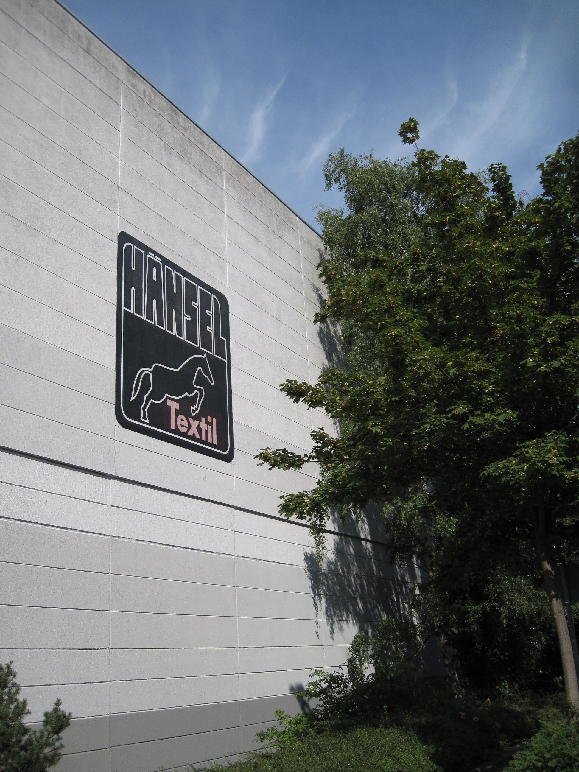 Fabrikgebäude Hänsel Textil in Iserlohn.